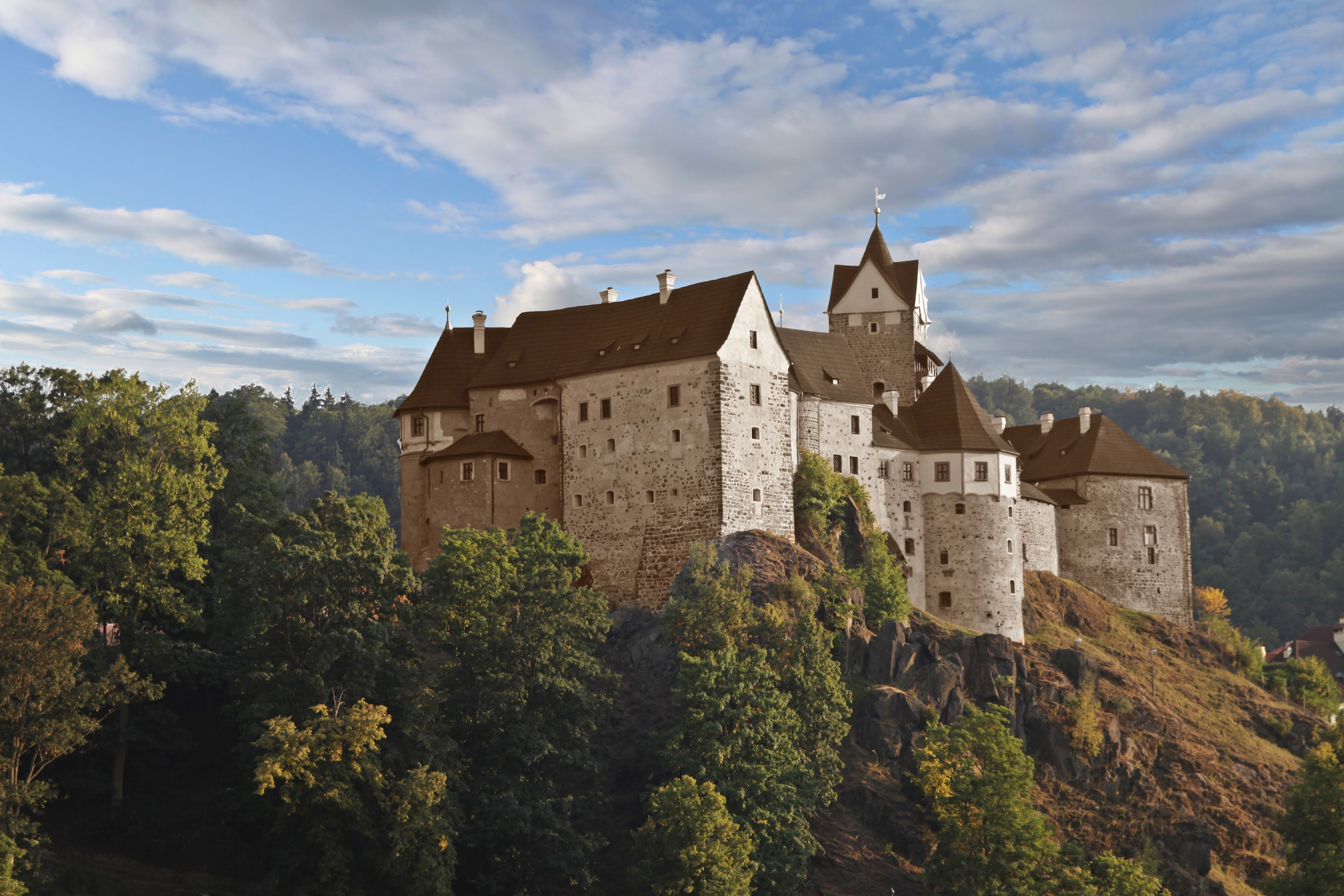 hrad